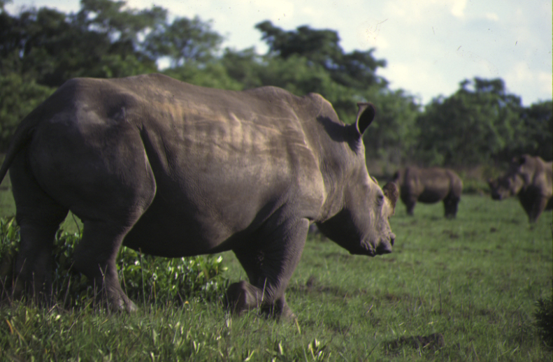 White rhino in Zimbabwe